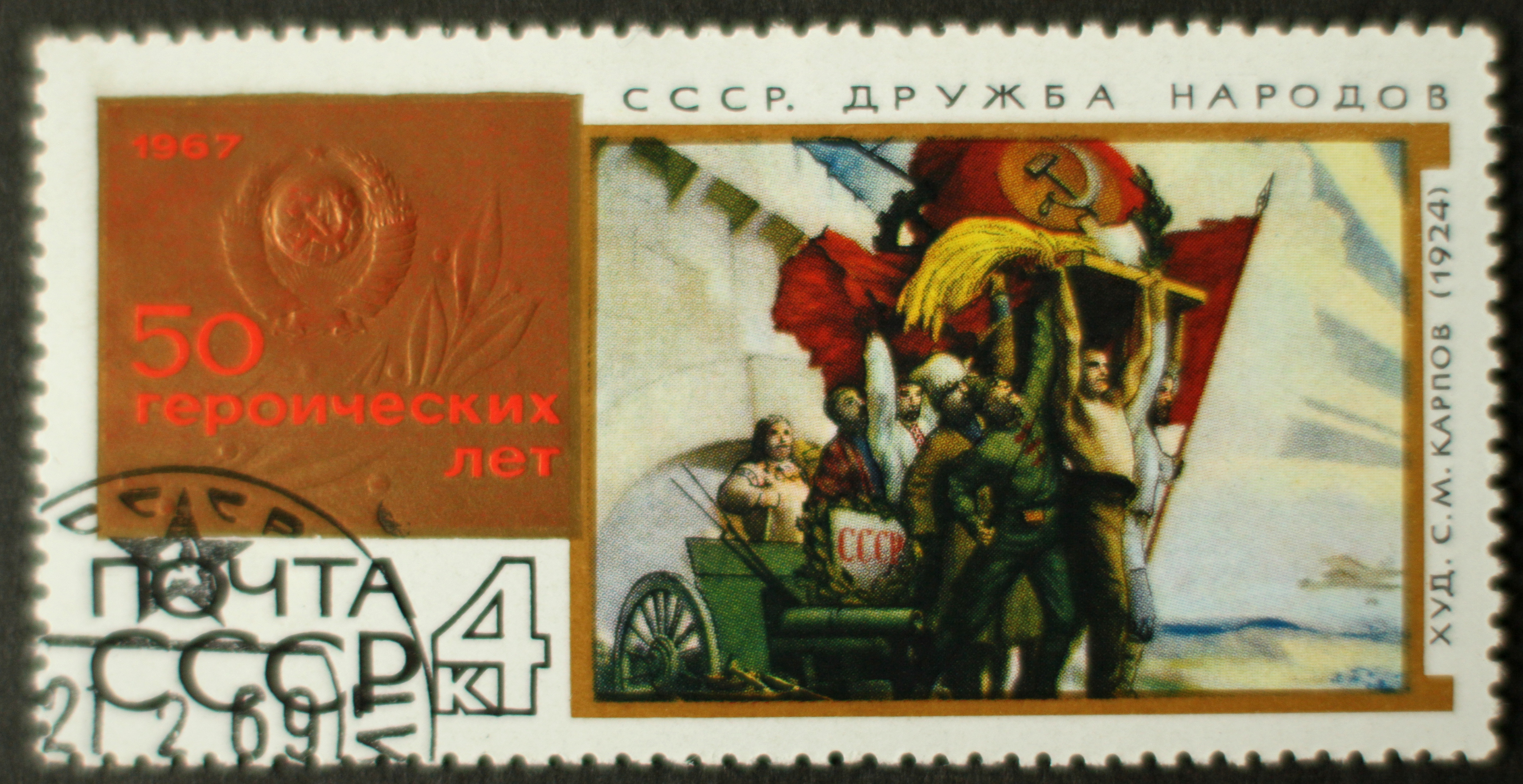 Briefmarke, Sowjetunion, 1967